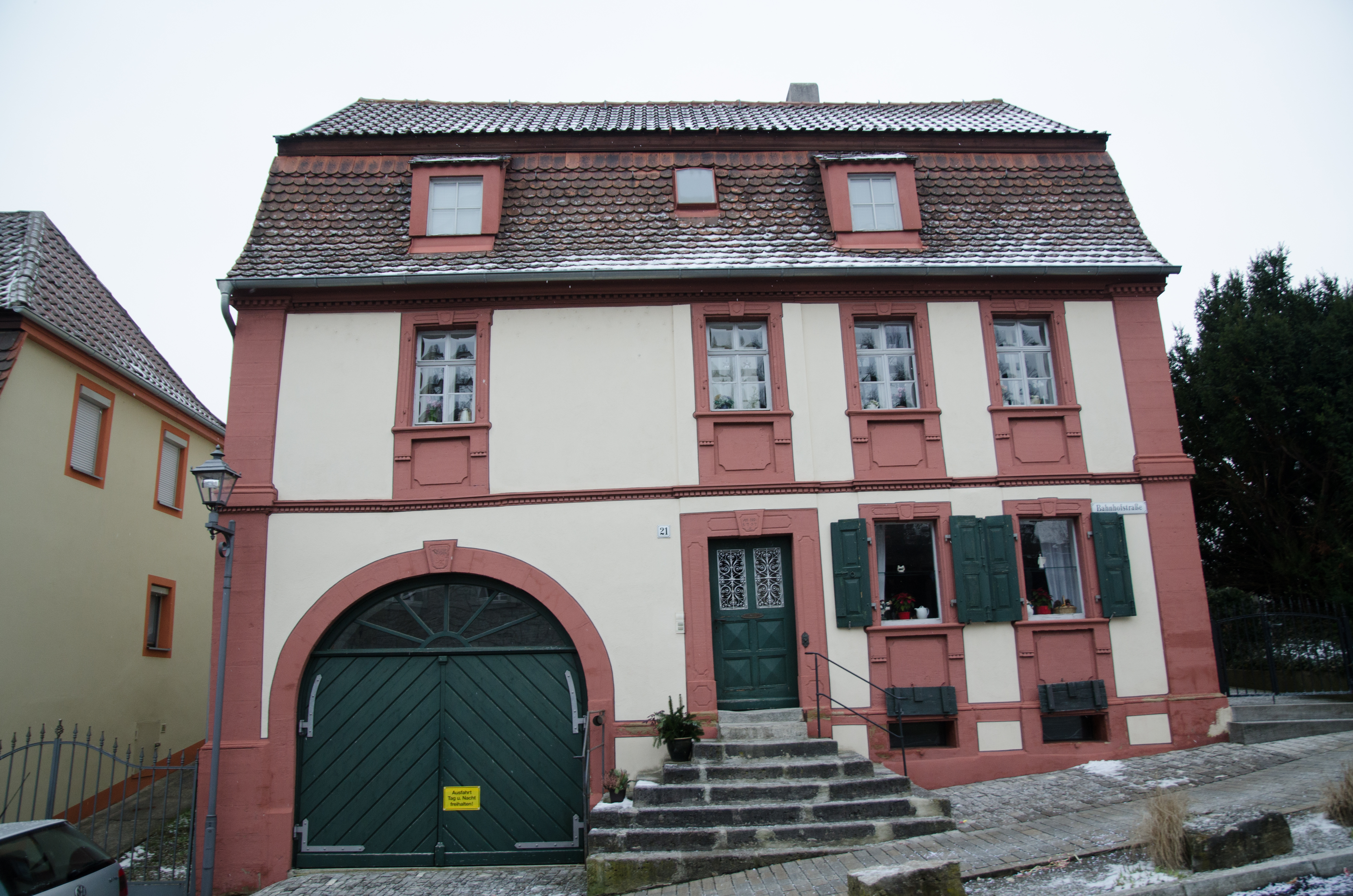 Marktbreit, Bahnhofstraße 21